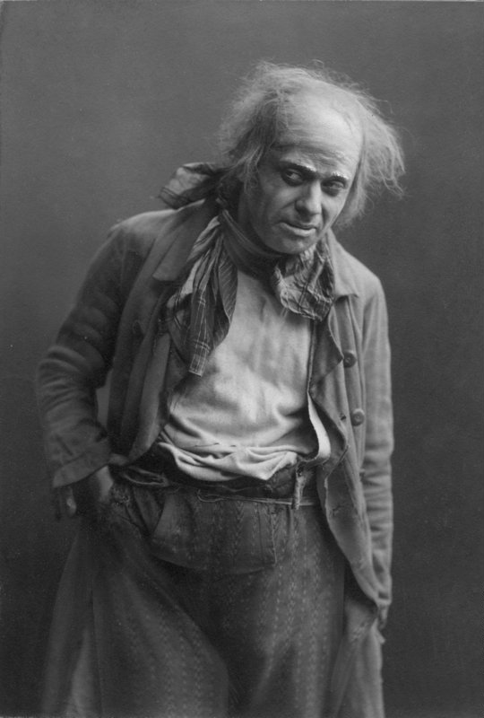 ADN-ZB Prof. Dr.h.c. Max Reinhardt Intendant, Regisseur und Schauspieler. Mitbegründer der Salzburger Festspiele, geb. 9.9.1873 in Baden/Wien gest. 30.10.1943 in New York UBz: M. Reinhardt in dem Schauspiel "Weber". 2944-42 Abgebildete Personen: Reinhardt, Max Prof. Dr.: Intendant, Regisseur, Schauspieler, Direktor Deutsches Theater Berlin, Deutschland